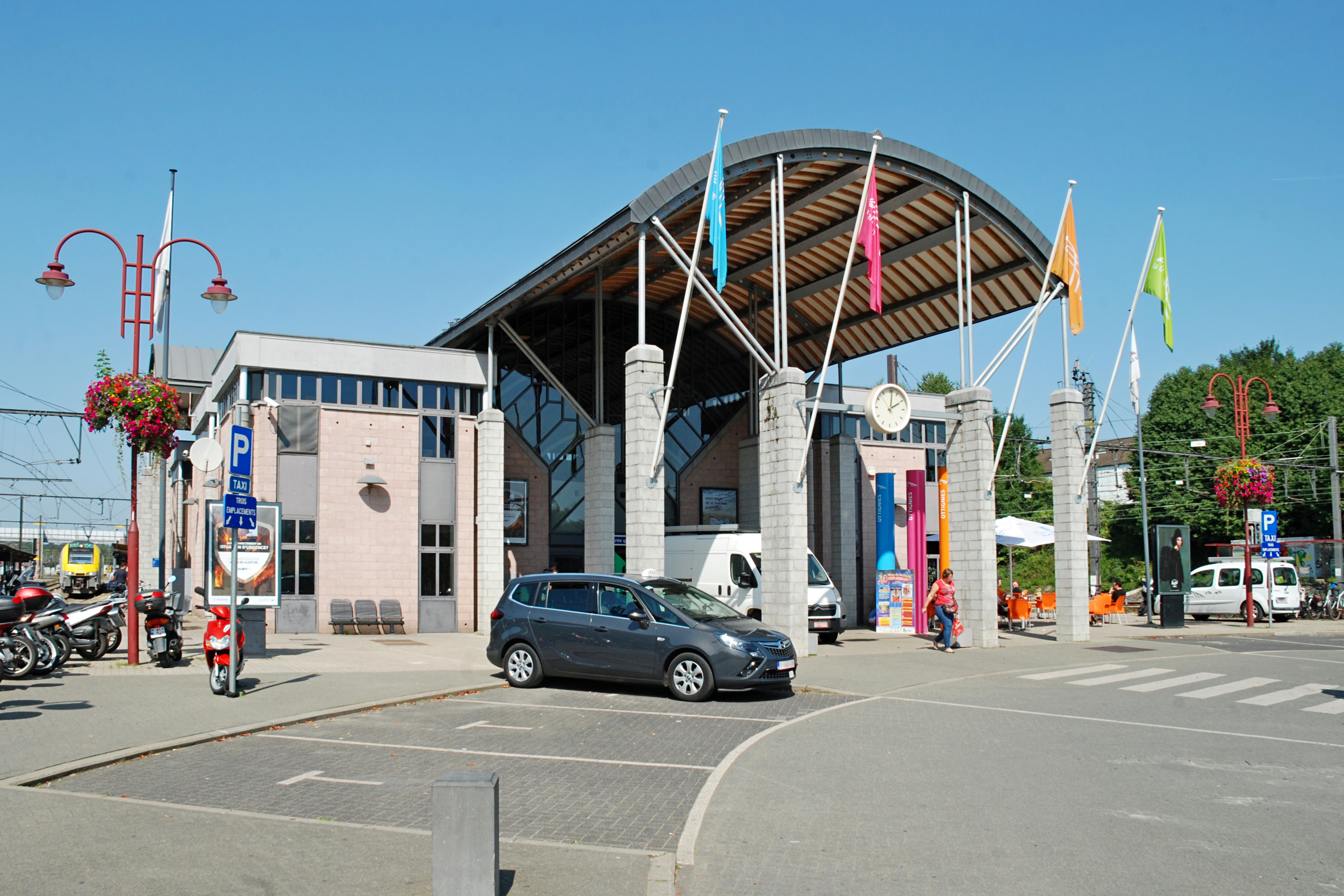 Belgique - Brabant wallon - Ottignies-Louvain-la-Neuve - Gare d'Ottignies